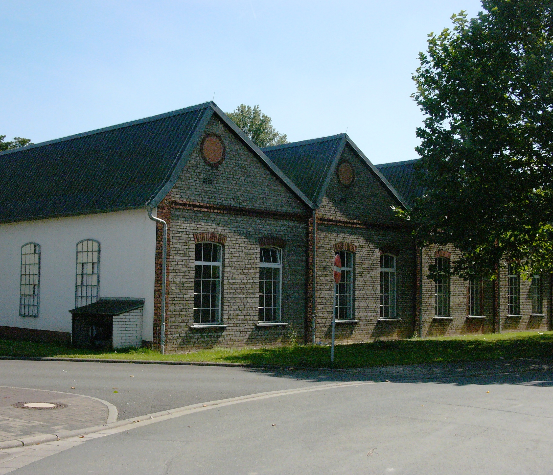 Werkshalle der Hollmann-Werke in Solms-Burgsolms (Lahn-Dill-Kreis, Hessen)